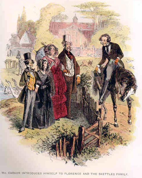 Dombey and Son, Mr Carker The Manager (James Carker), adjoint véreux de Mr Dombey, se présente à Florence, et la famille Skettles (Sir Barnet and Lady Skettles) à Mr Bunsby, chapitre 24.